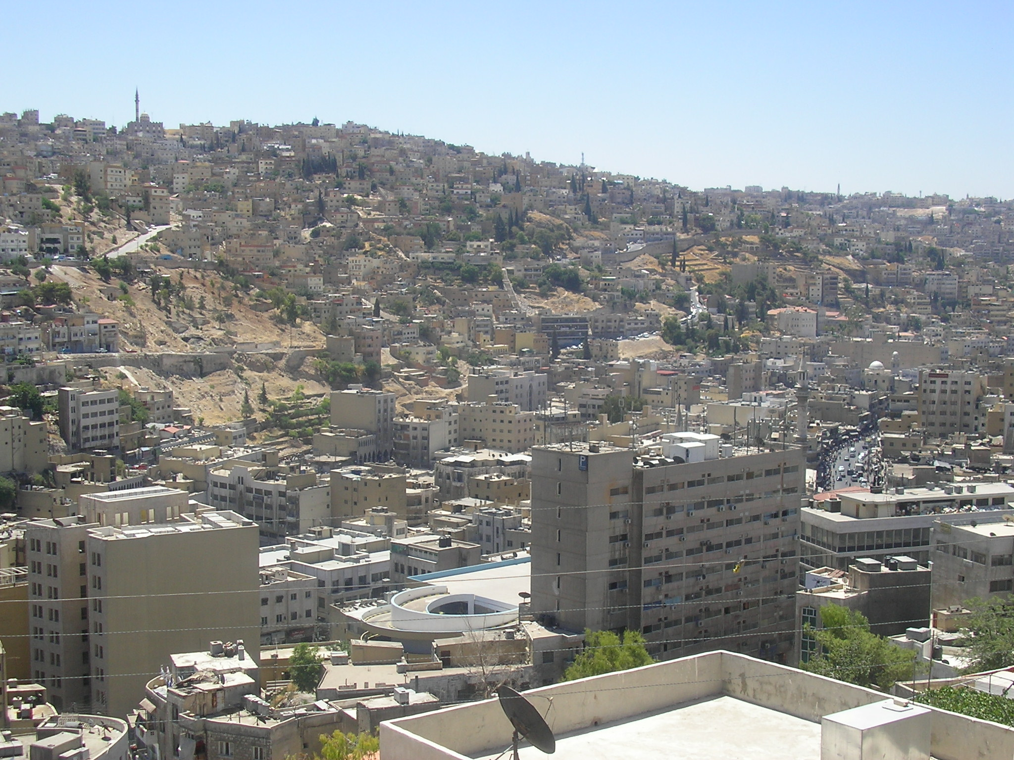 Panorama diurno di Ammann